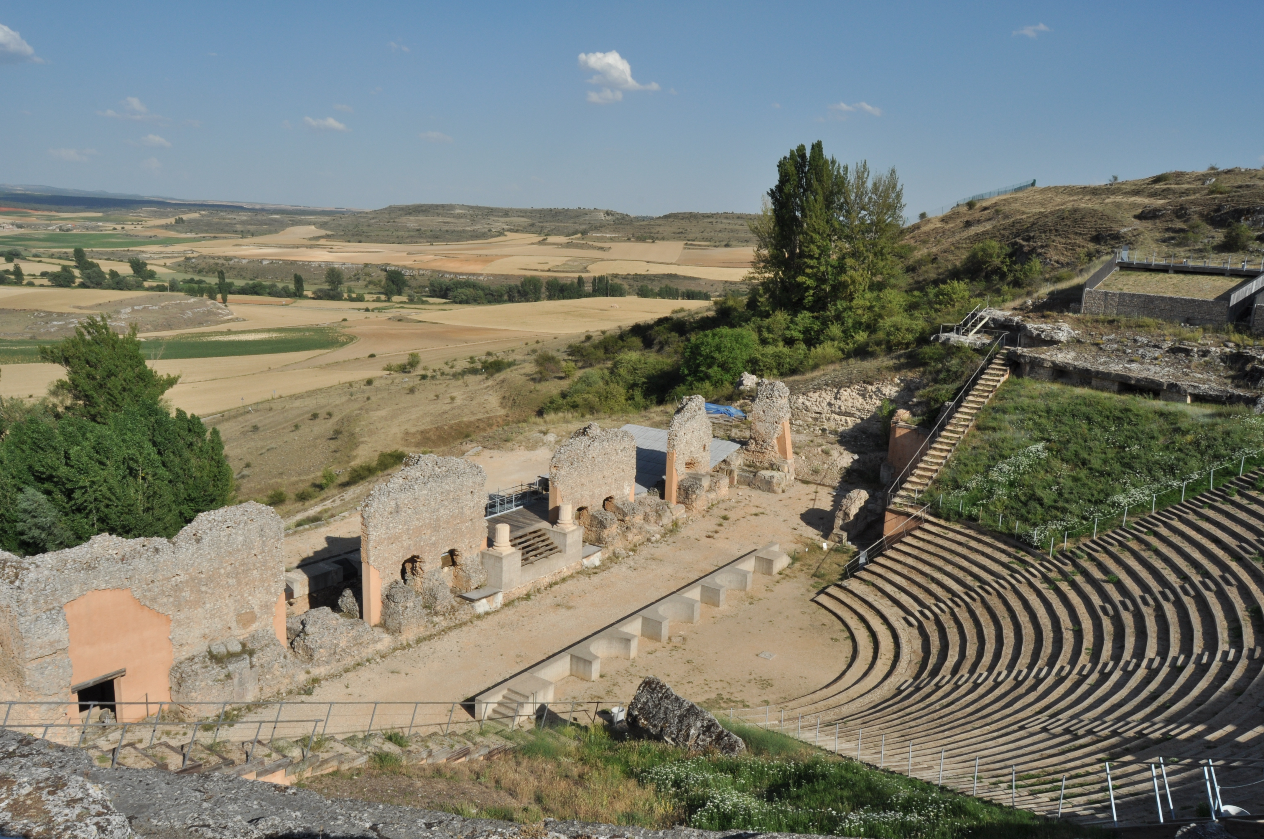 Clunia Sulpicia (Peñalba de Castro) - 002